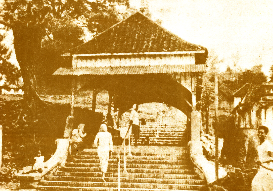 Gapura menuju undakan pertama yang kini digunakan sebagai jalan masuk menuju masjid di Giri Kedaton